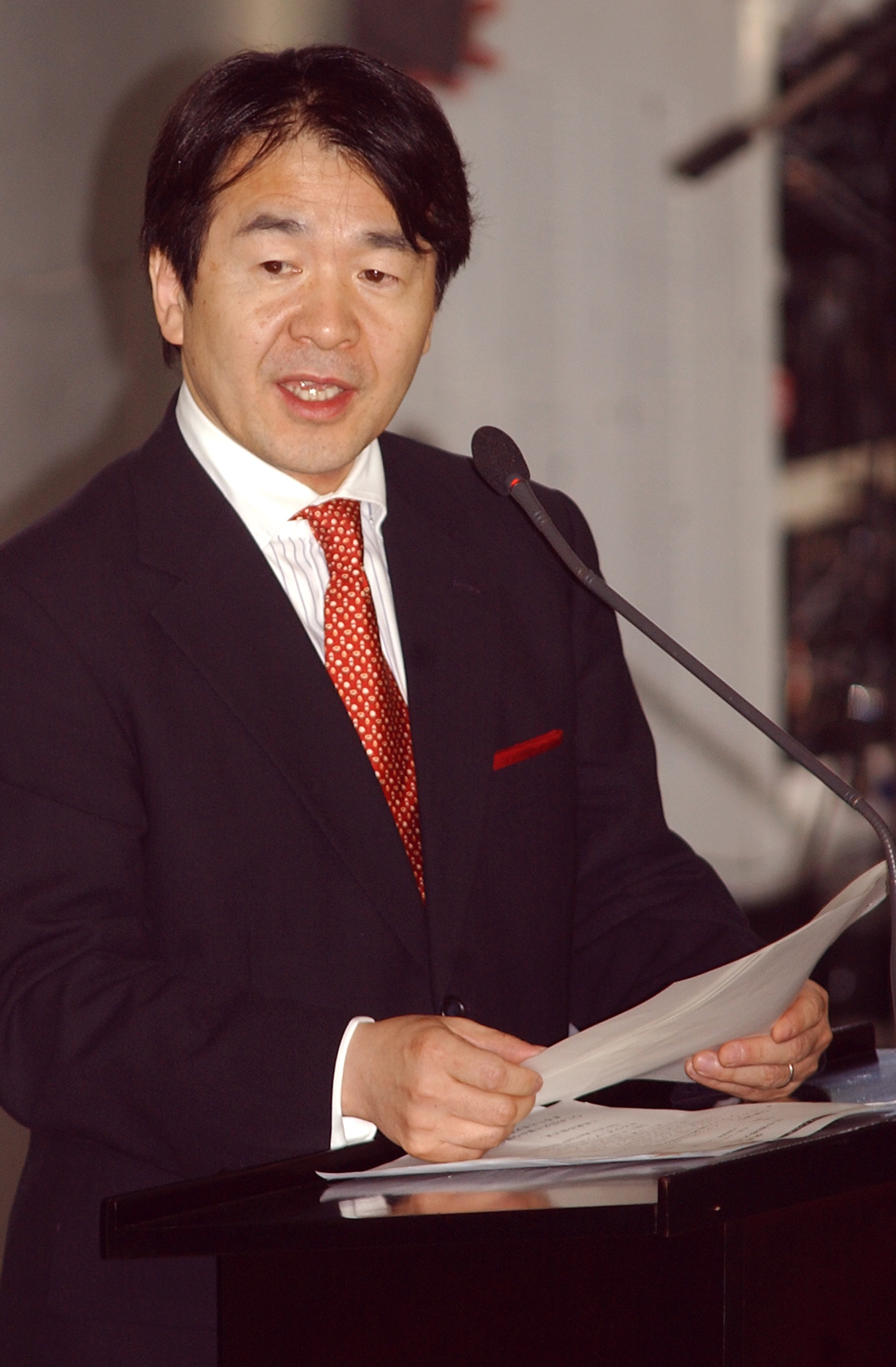 Heizo Takenaka